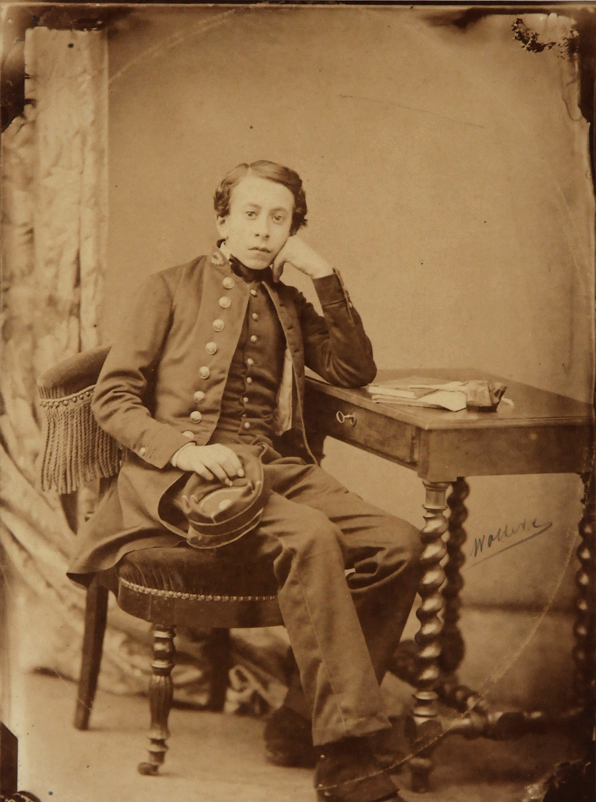 Tristan Corbière en uniforme de lycéen, vers 1862, photographe inconnu, 18 x 13 cm. Étude Ader-Tajan, vente Jacques Guérin n°7, le 25 mai 1992, lot n°32 puis vente Sotheby's 2010.